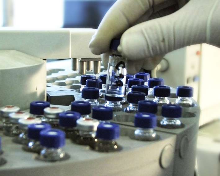 Laboratorio